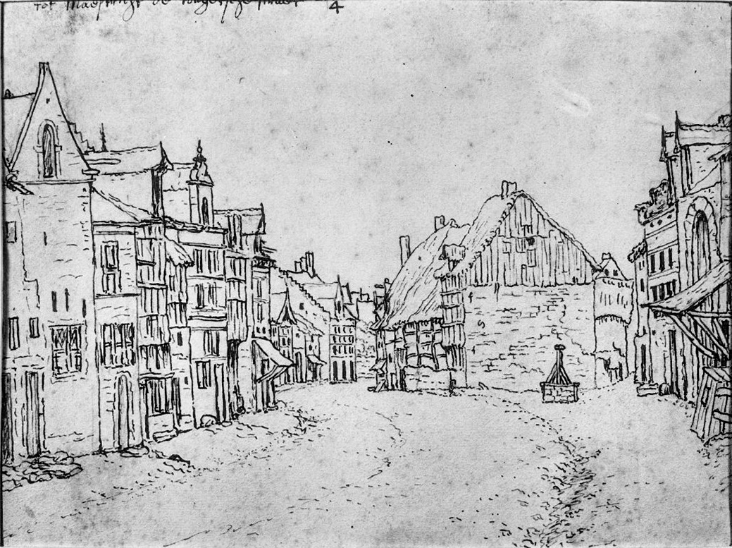 overzicht, van J.de Grave, 1670